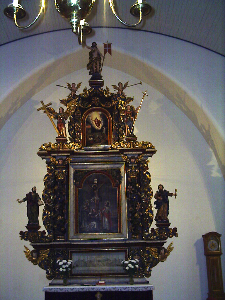 Altartavlan i Tegneby kyrka, Tegneby församling, Orusts kommun.